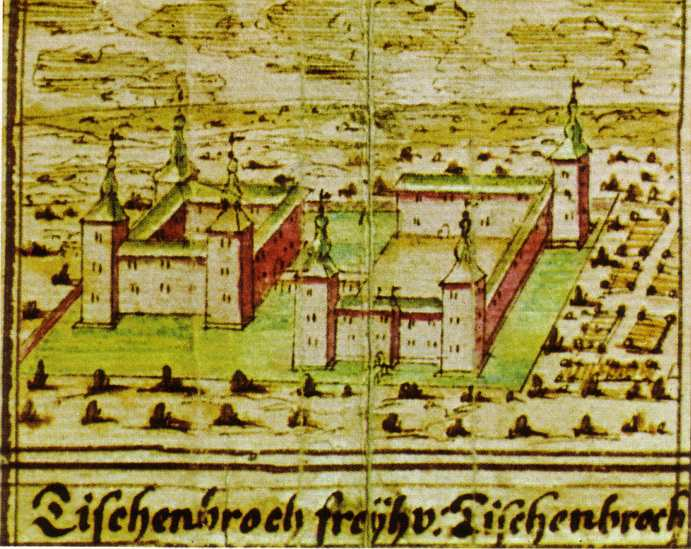 Burg Tüschenbroich, Wegberg, Codex Welser